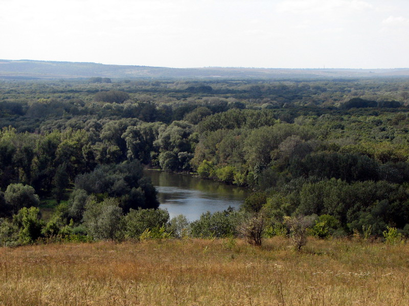 Seversky Donets near Shipilivka, Ukraine